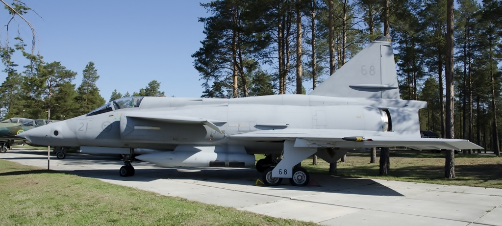 AJSF 37 Viggen, här utställd på Flygmuseet F 21 i Luleå. Individen levererades ursprungligen till F 21 år 1980 som en SF 37 Viggen, och tjänstgjorde där som "F 21-68". Under åren 1995-1997 ingick den i en grupp om 13 individer vilka modifierades till AJSF 37 Viggen. Individen var i tjänst till år 2000, då den kasserades med en flygtid på 2082 timmar .